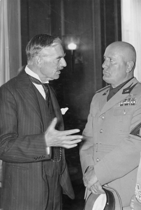 Münchener Abkommen, Chamberlain mit Mussolini ADN-Zentralbild / Archiv Zum Viermächte-Abkommen in München am 29.9.1938. UBz: Begegnung zwischen dem britischen Ministerpräsidenten Neville Chamberlain und Benito Mussolini am Tage der Unterzeichnung des Abkommens im Führerbau am Königlichen Platz in München. 29.9.1938 16045-38 Abgebildete Personen: Chamberlain, Neville Arthur: Premierminister, Großbritannien Mussolini, Benito: Ministerpräsident, Regierungschef, Chef des Faschistischen Großrates, Italien